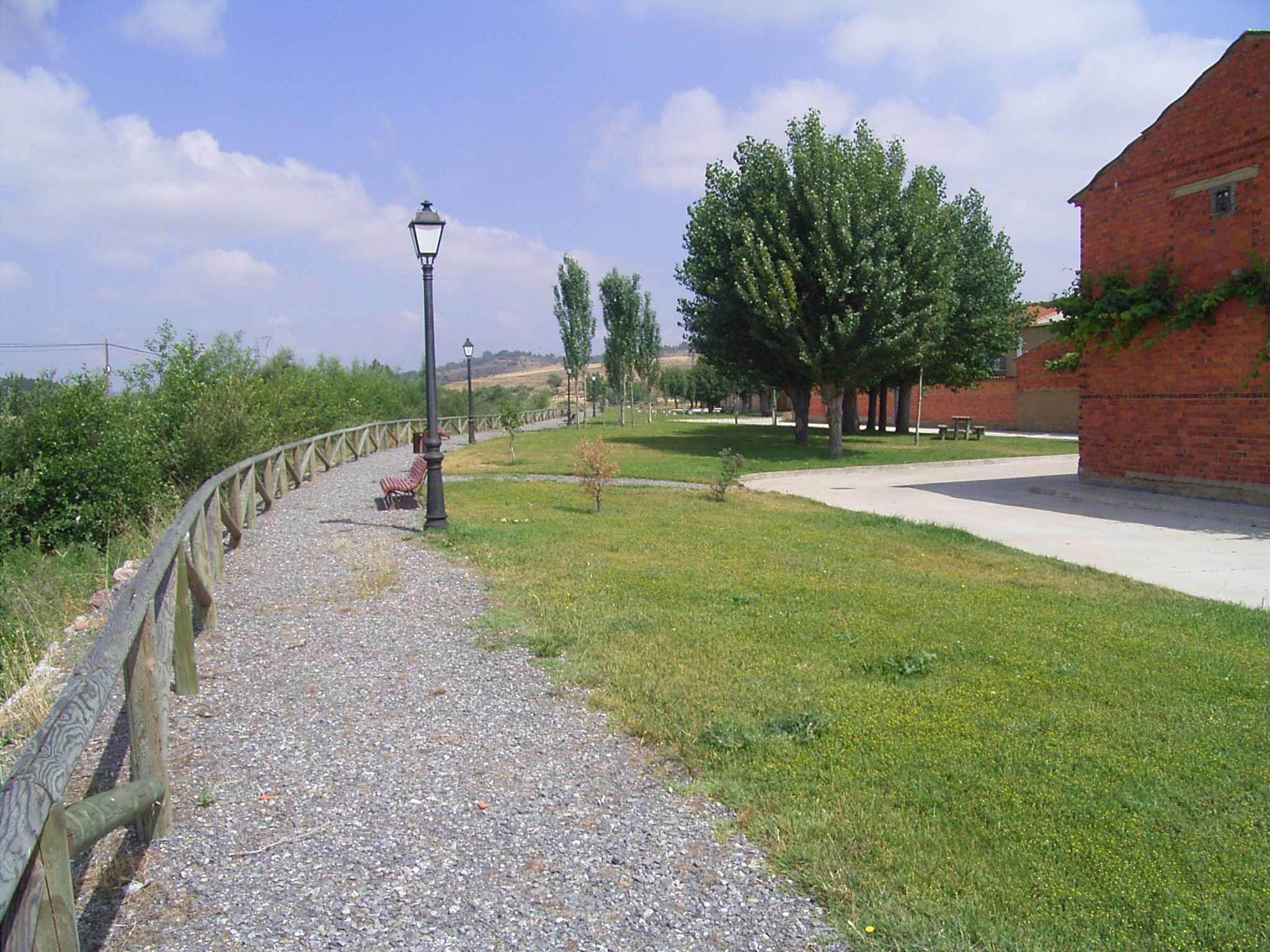 Paseo del río Barbadiel en Turcia (León).